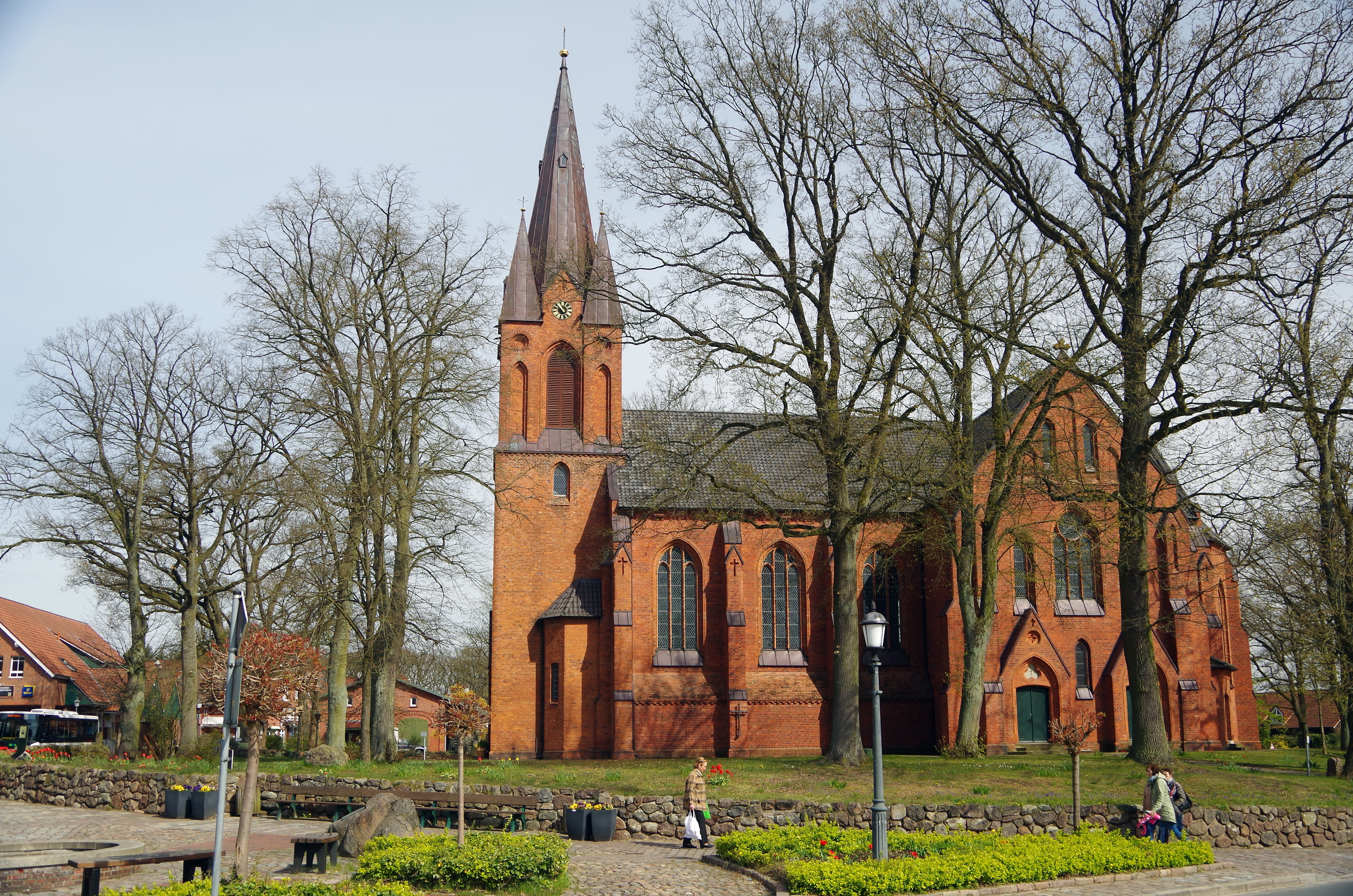 St. Jakobi Hanstedt Nordheide